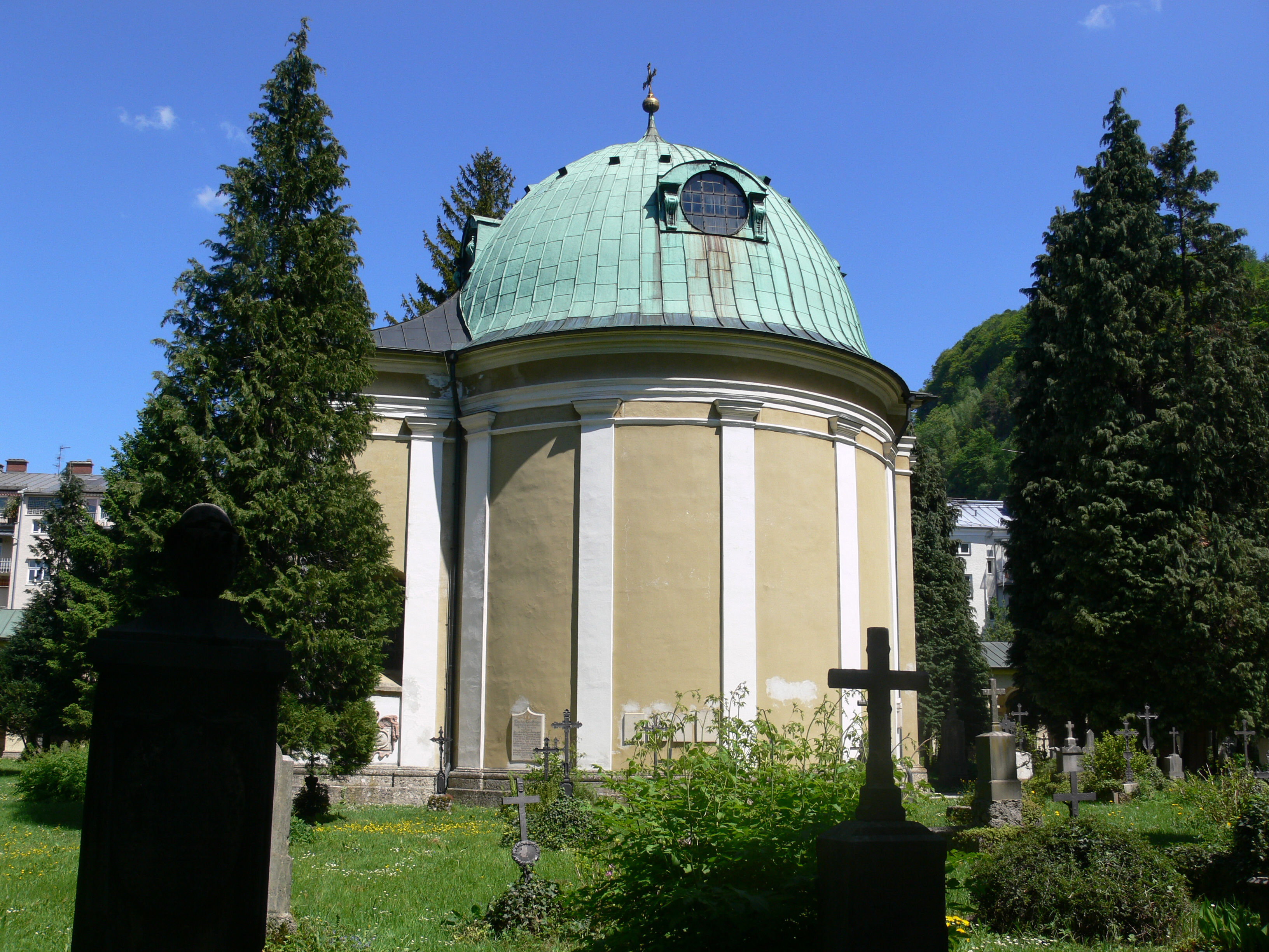 Sebastiansfriedhof Salzburg Mausoleum für Fürsterzbischof Wolf Dietrich von Raitenau (Gabrielskapelle)